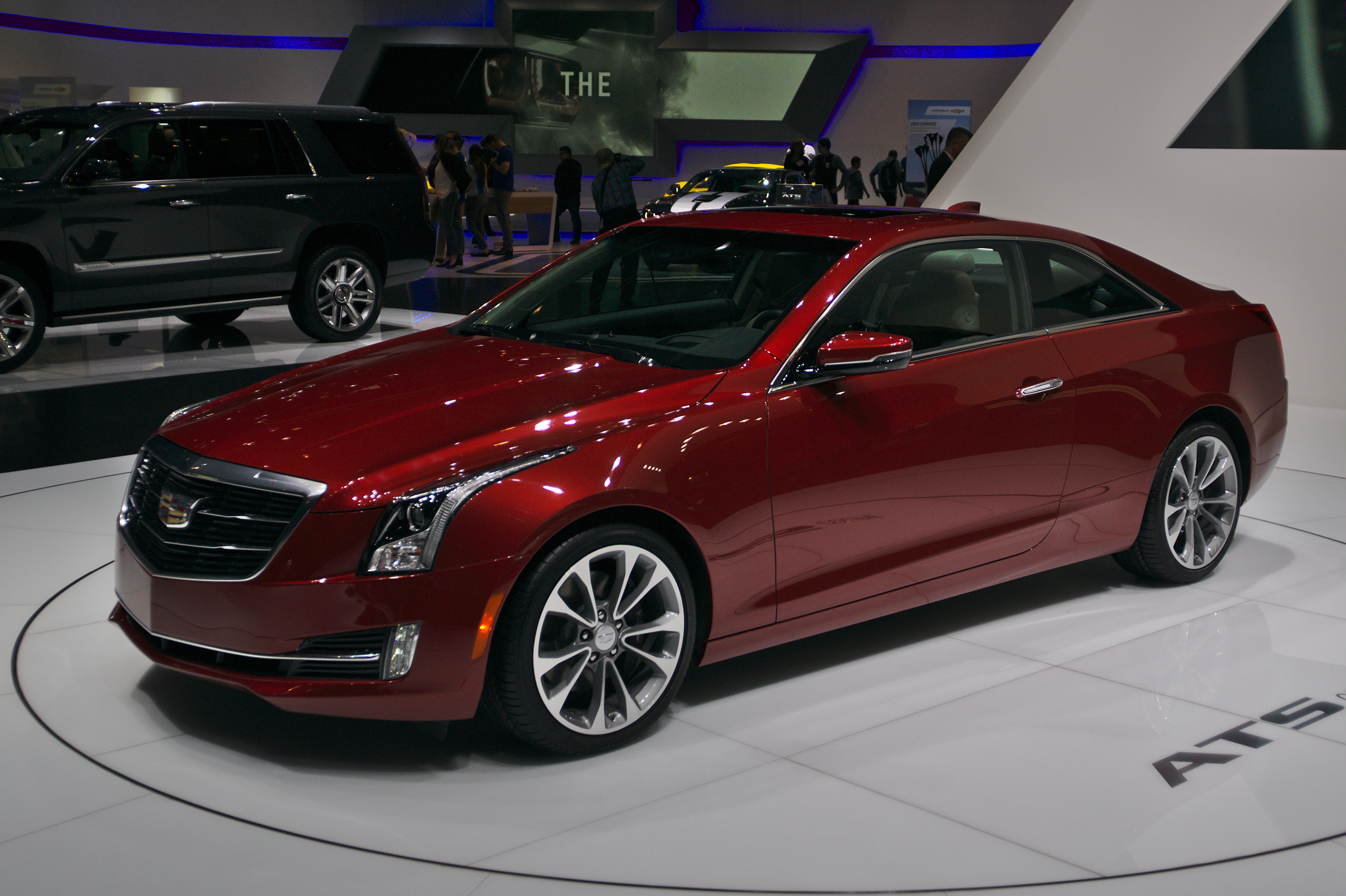 Salon de l'auto de Genève 2014 - 20140305 - Cadillac ATS Coupé